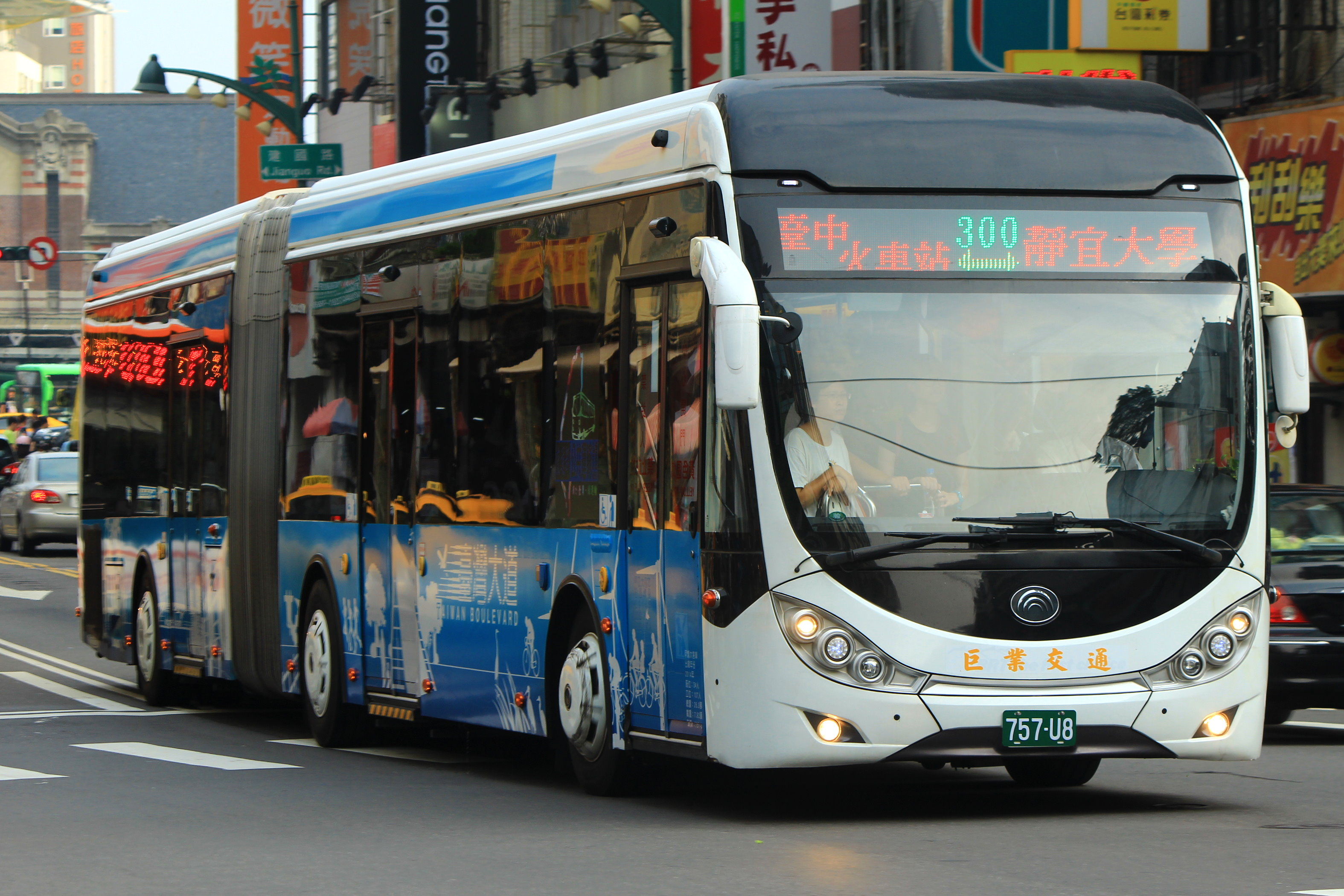 中文（台灣）: 巨業交通台灣宇通ZK6180HGC雙節低底盤公車757-U8，行駛台中市公車300路。